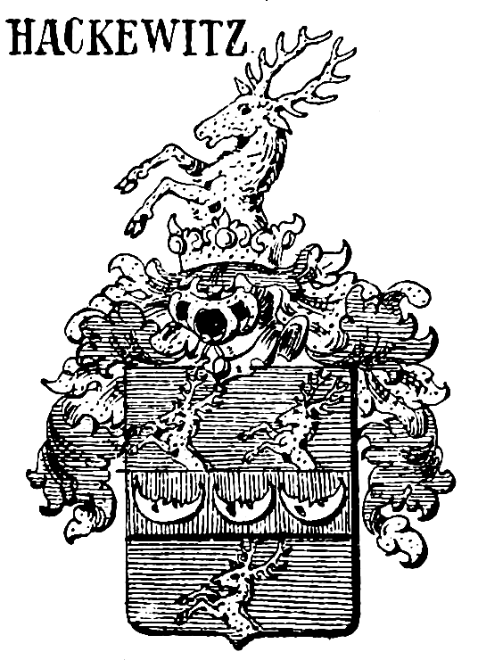 Wappen derer von Hackewitz